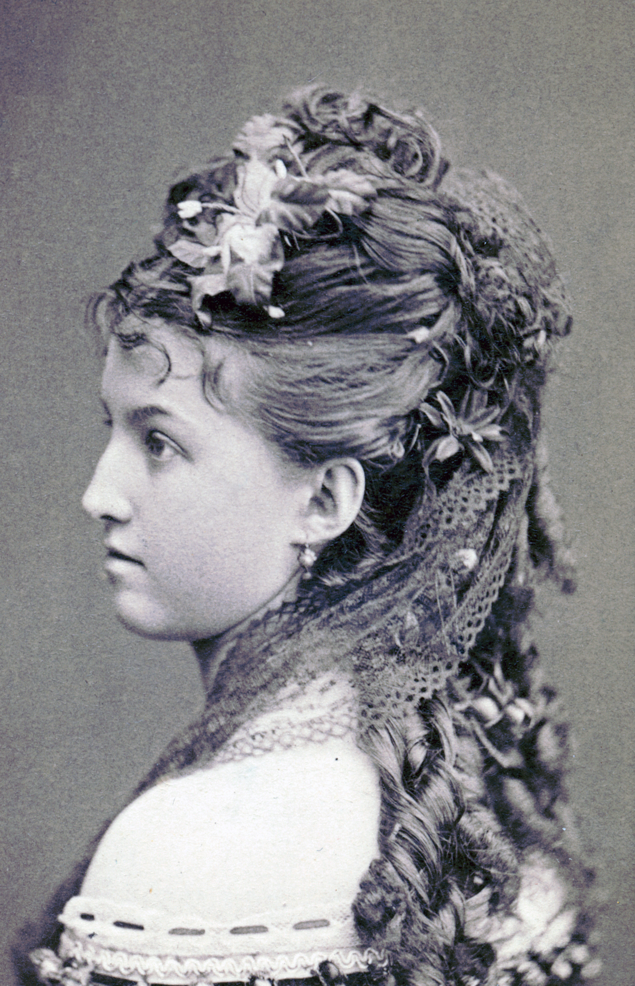 Maria Westberg (1853-1893), dansare vid Kungliga teatern (Operan) 1869